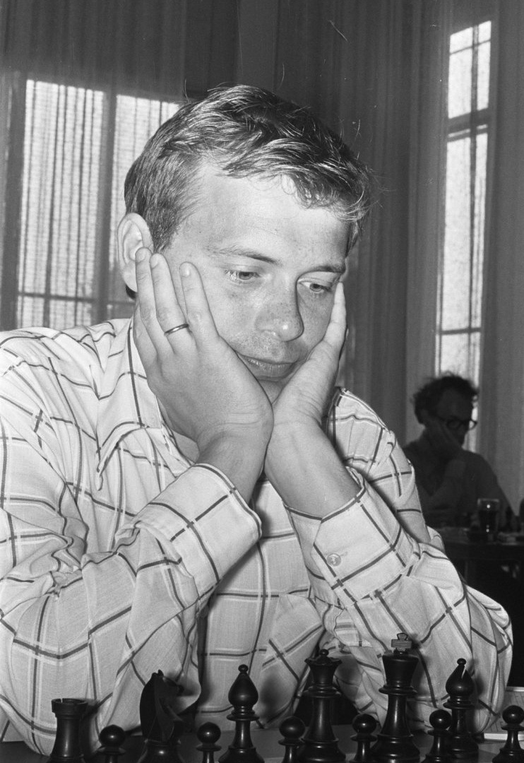 Yuri Razuvaev